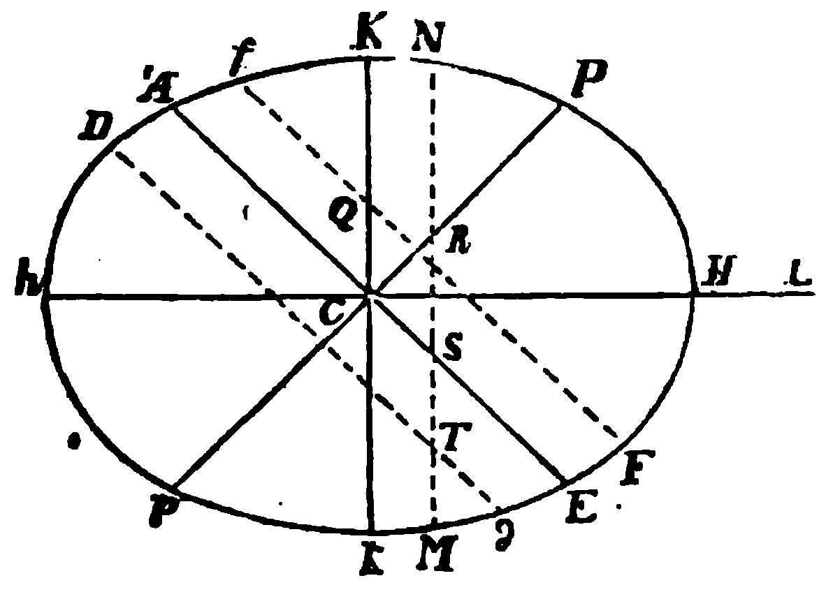 NewtonFiguren